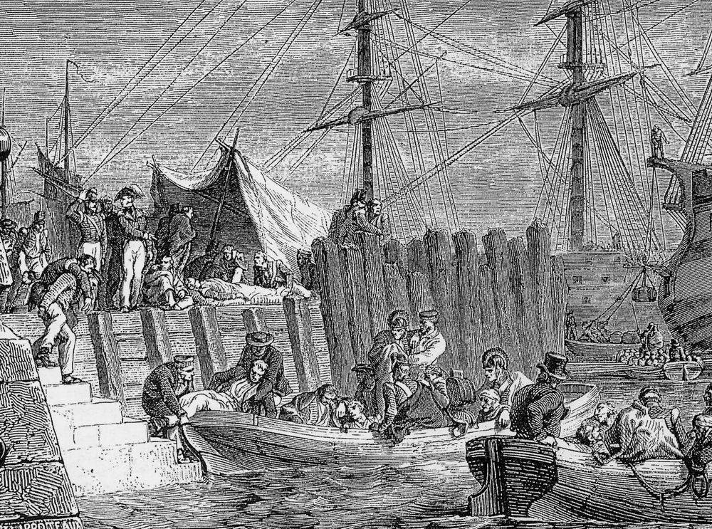 Evacuation de Walcheren par les Anglais - 30 août 1809 - Composition de PHILIPPOTEAUX